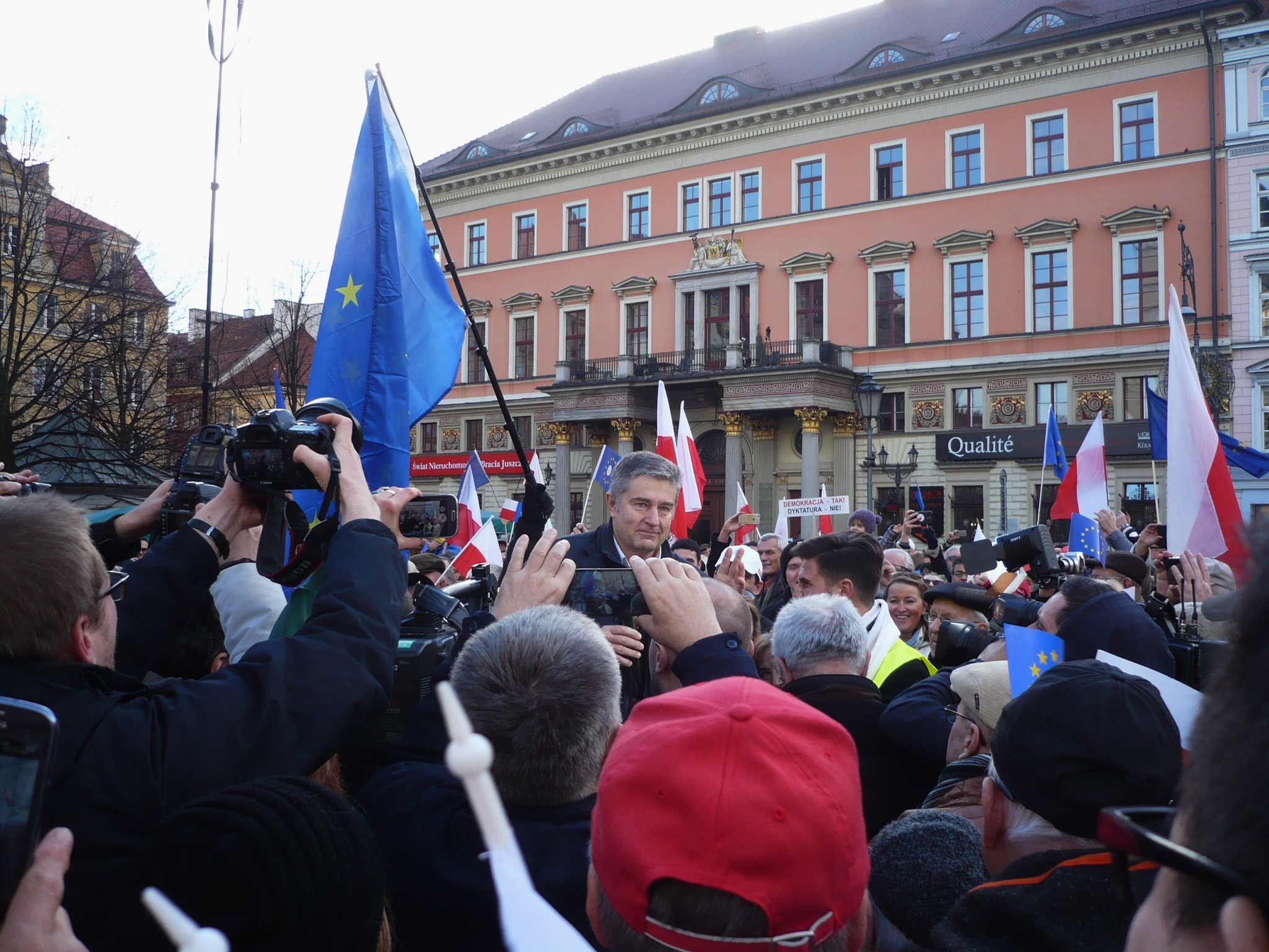 Władysław Frasyniuk na demonstracji KOD we Wrocławiu, 19.12.2015 r.